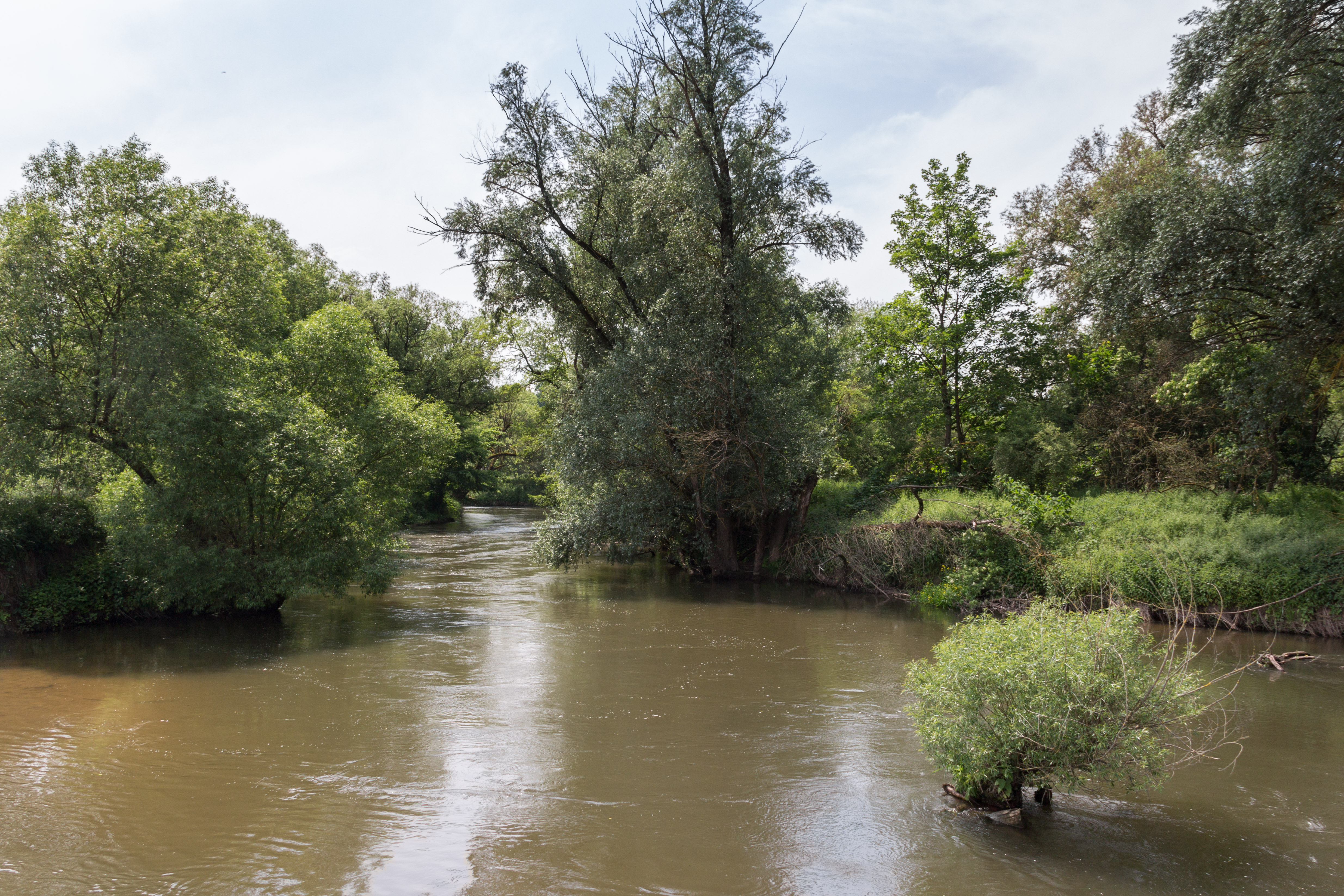 Rednitztal zwischen Katzwang und Wolkersdorf, LSG Rednitztal - Süd, FFH-Gebiet Rednitztal in Nürnberg